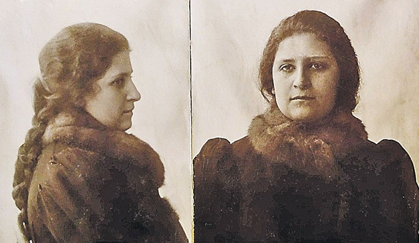 Фейга Хаимовна Ройдман-Ройтман-Ройтблат - Фанни Ефимовна Каплан